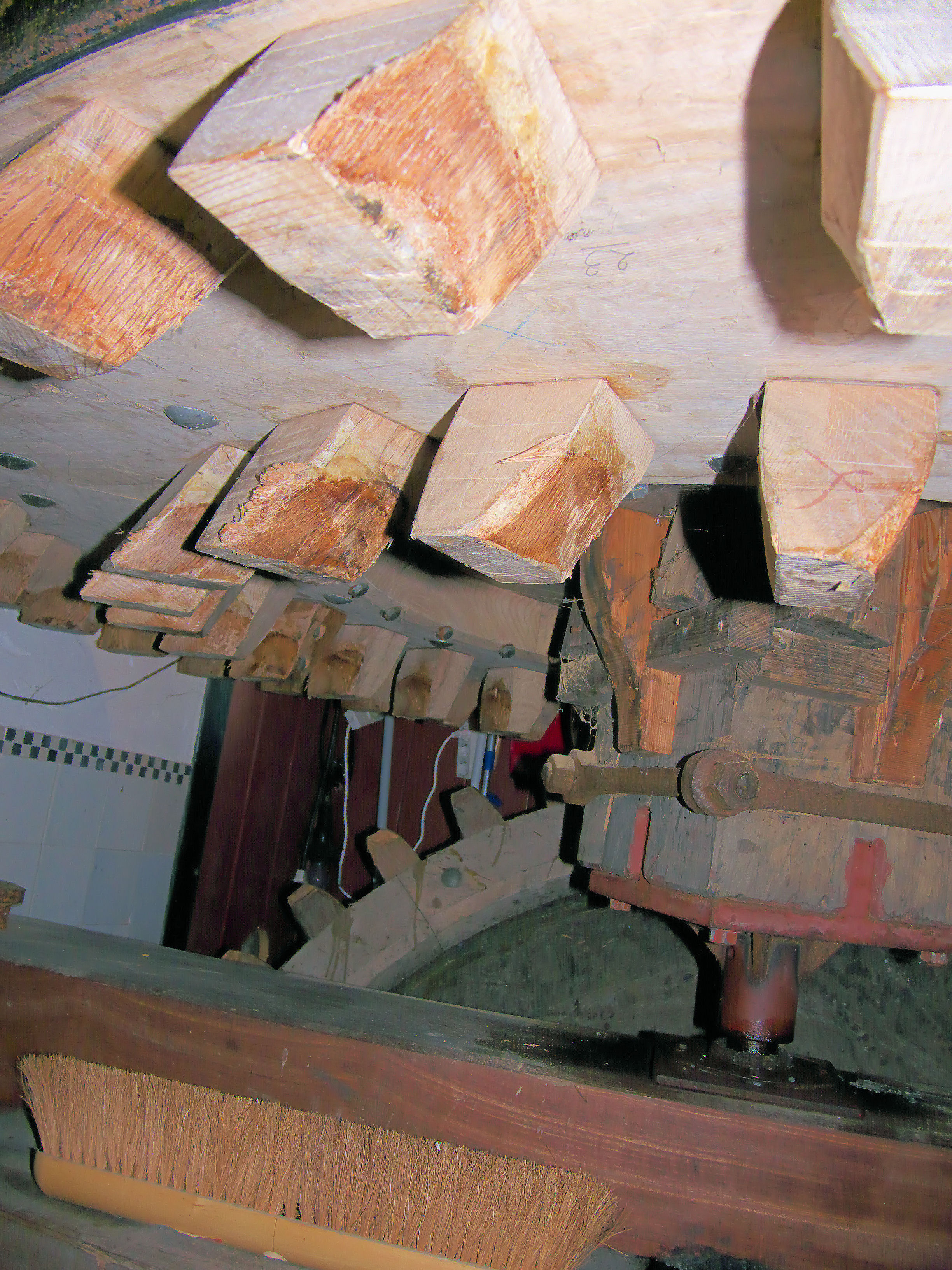 Tweede Broekermolen dubbele gang kammen onderbonkelaar